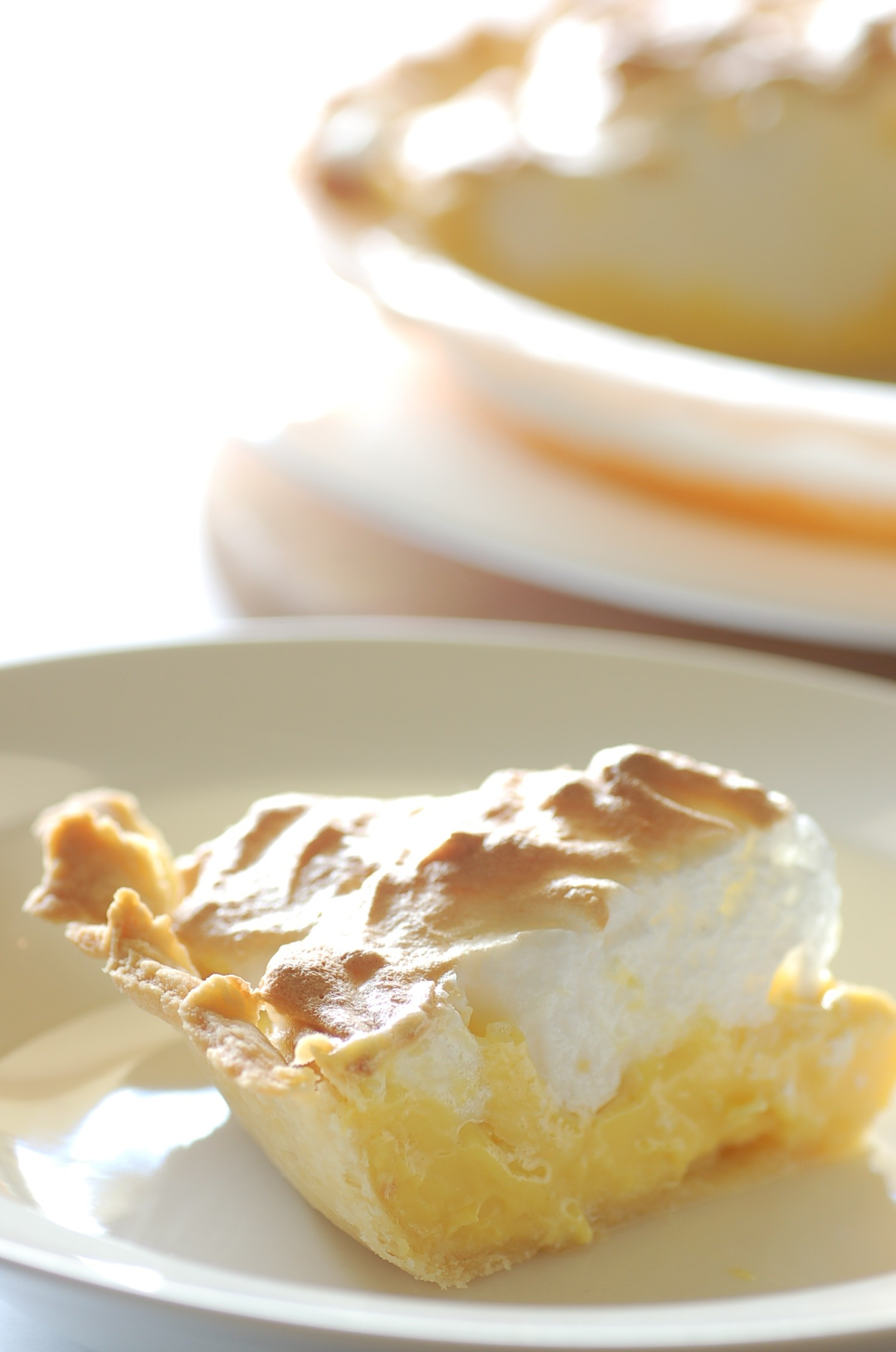 Mum's lemon meringue pie slice.